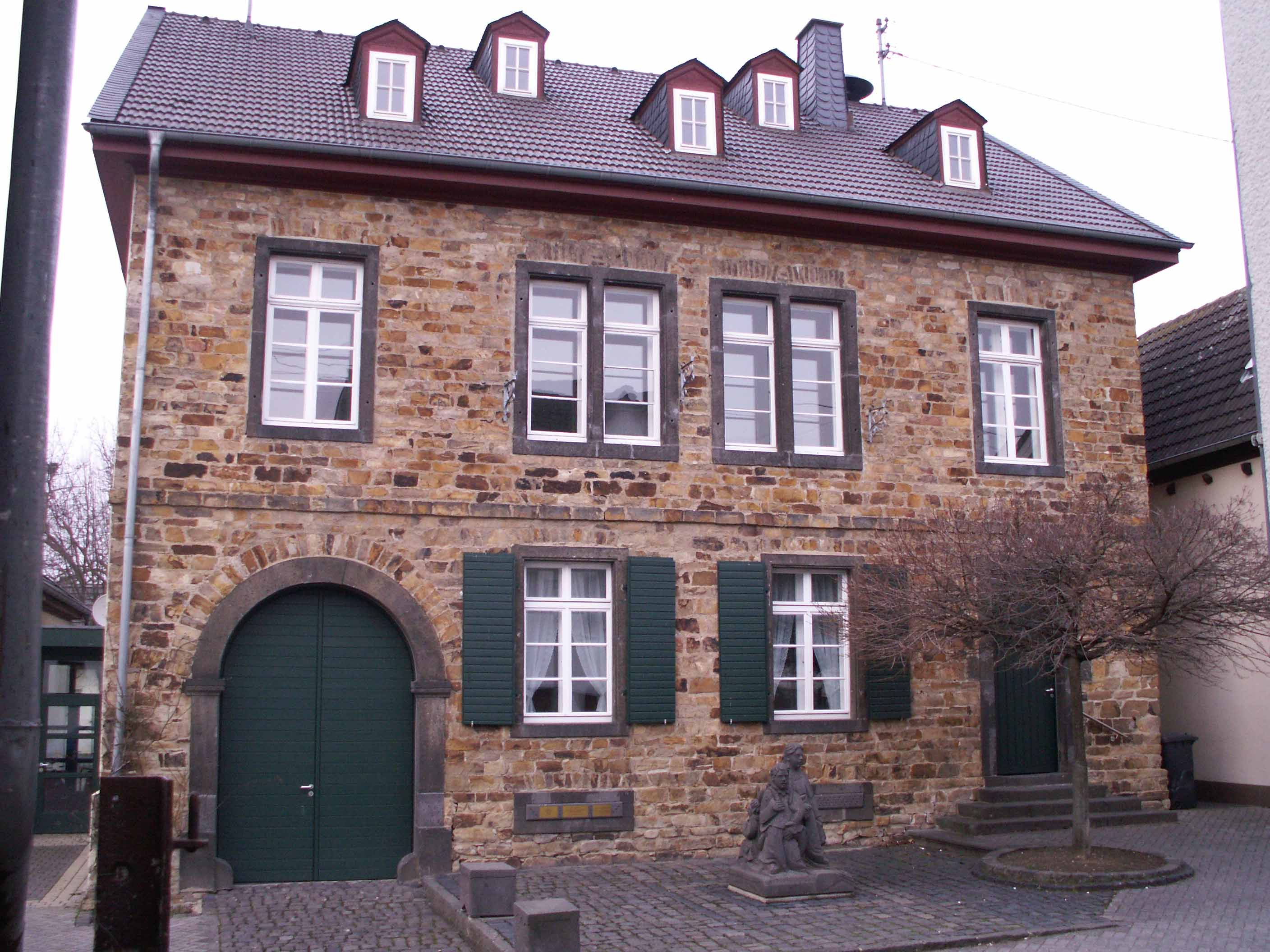 Dorfgemeinschaftshaus Löhndorf (ehemaliges Schulgebäude), Orsbeckstraße 4